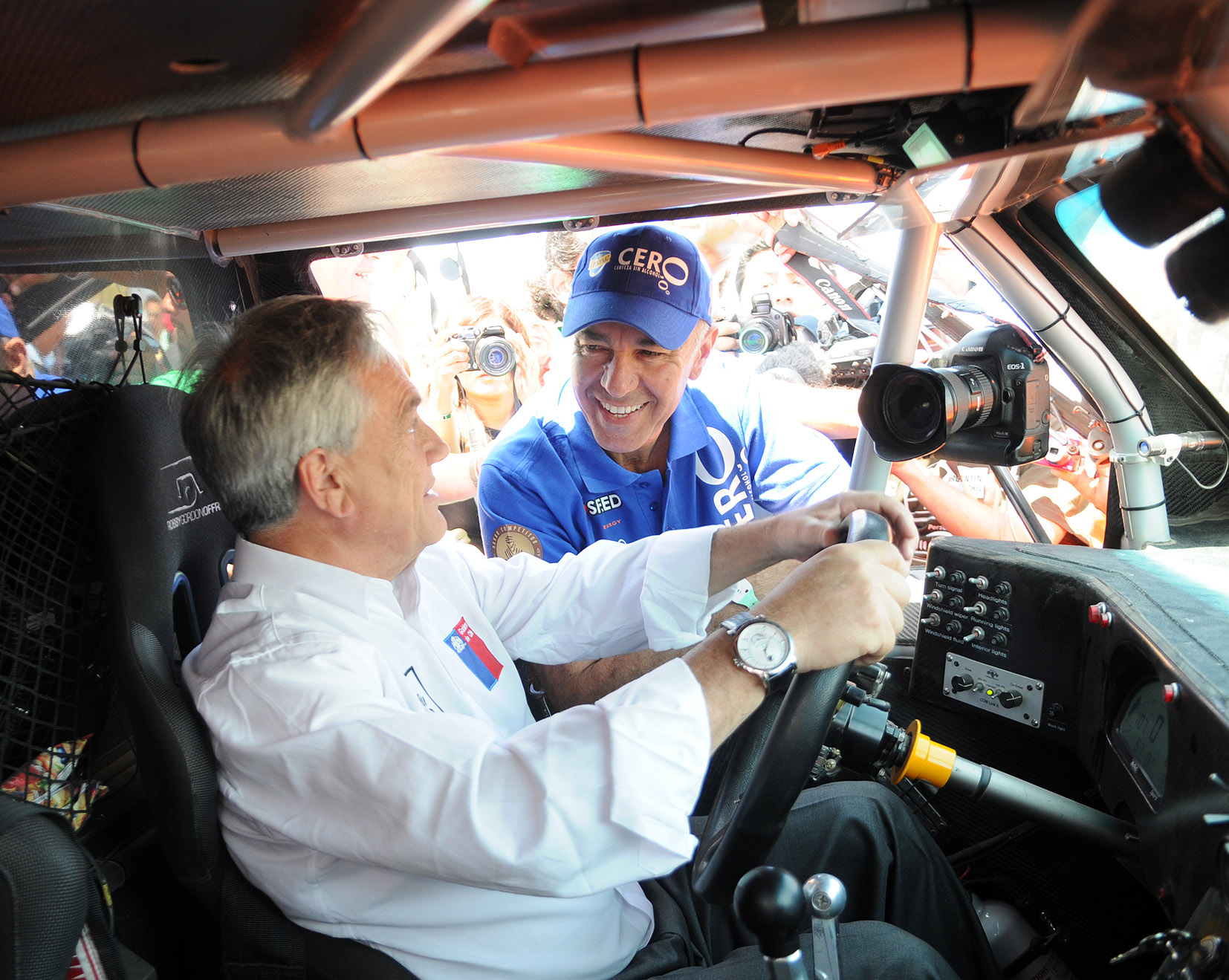 Presidente de Chile Sebastián Piñera visita campamento Rally Dakar 2011. En la foto junto a Eliseo Salazar.